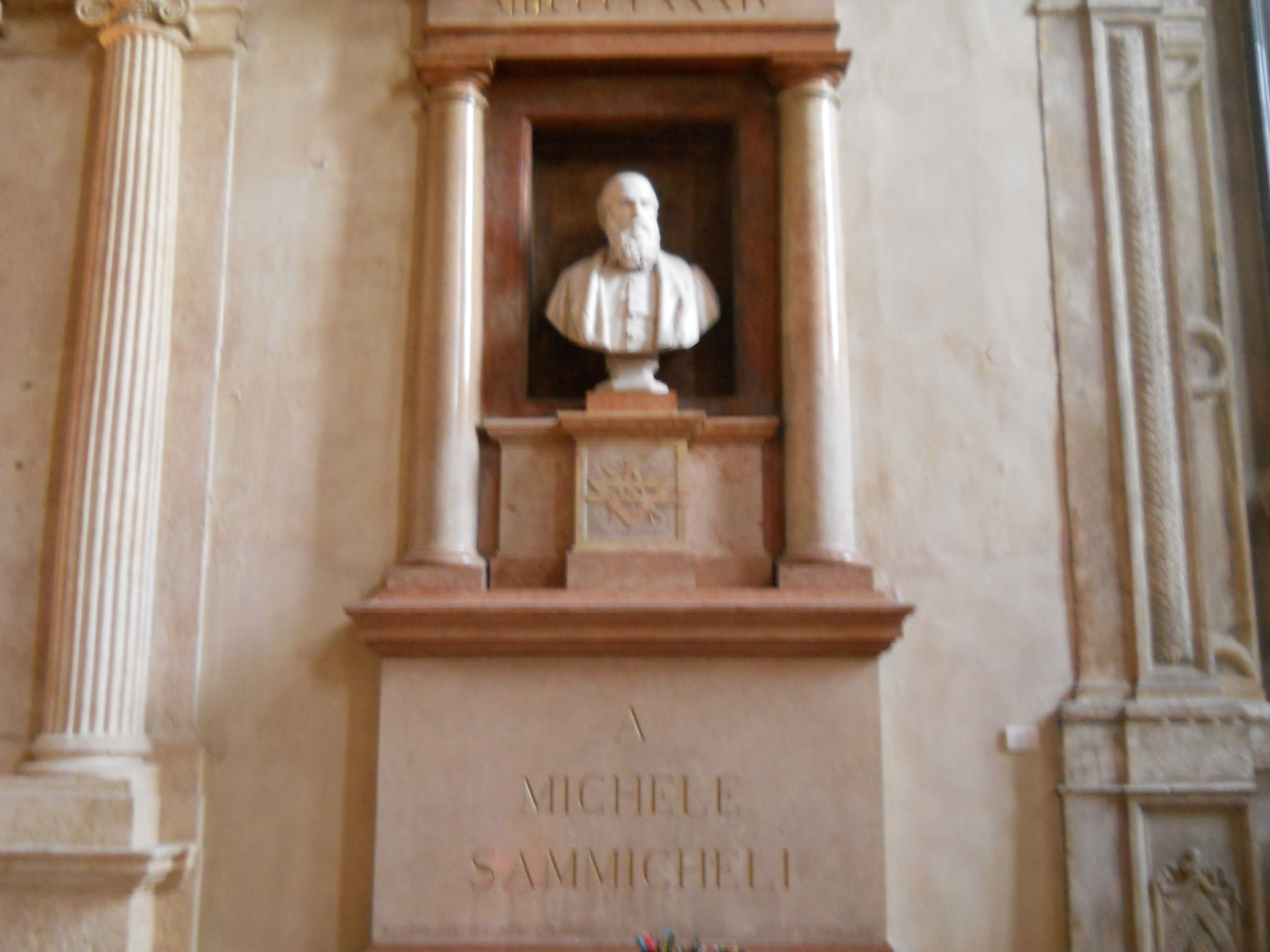 Monumento funebre a Michele Sanmicheli presso la chiesa di San Tomaso Cantuariense a Verona